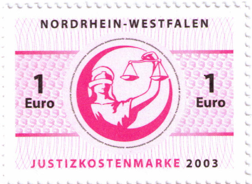 Kostenmarke aus Nordrhein-Westfalen, Wert 1 Euro